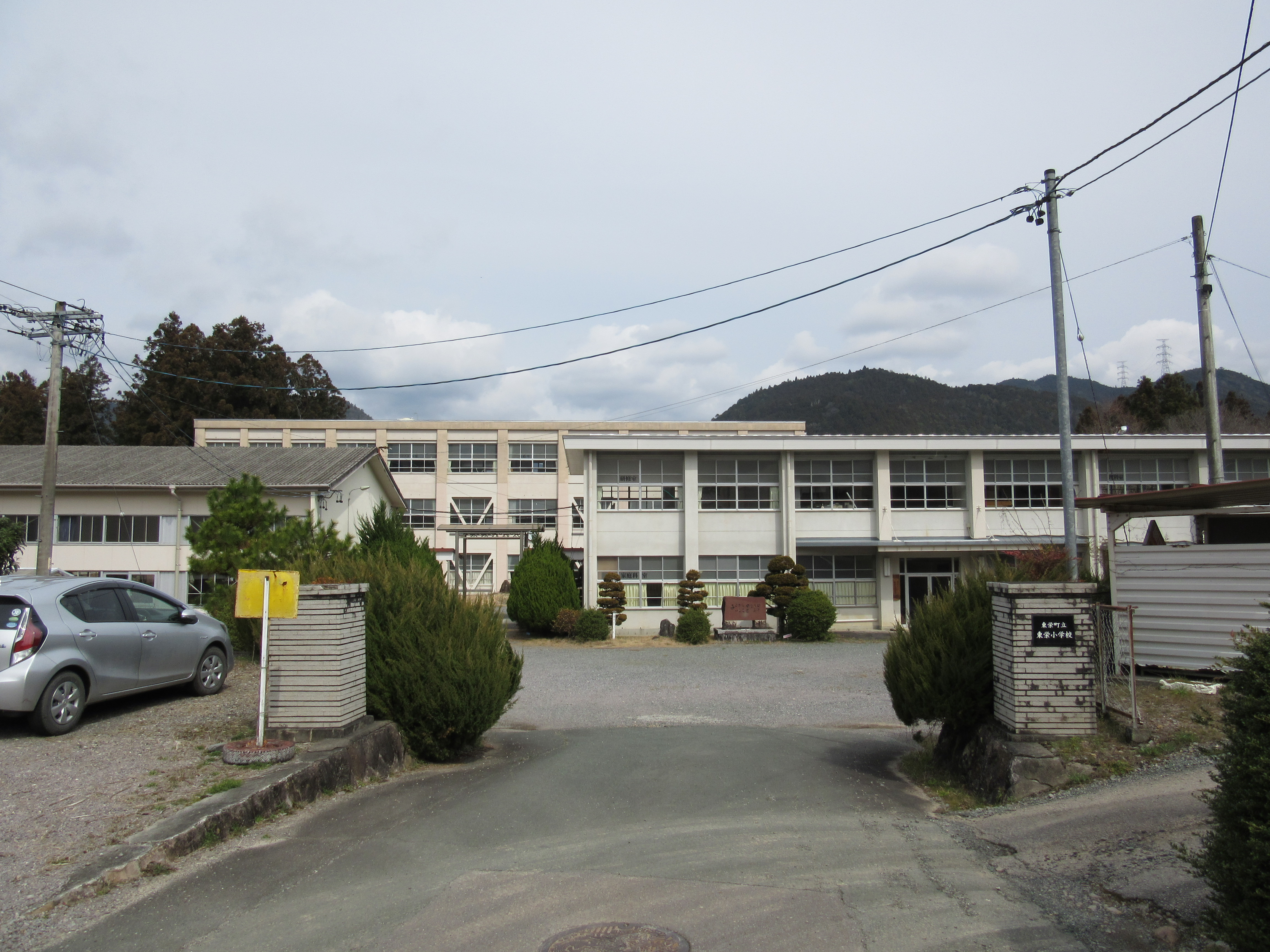 愛知県北設楽郡東栄町の東栄町立東栄小学校。2013年まで使われていた旧校地。